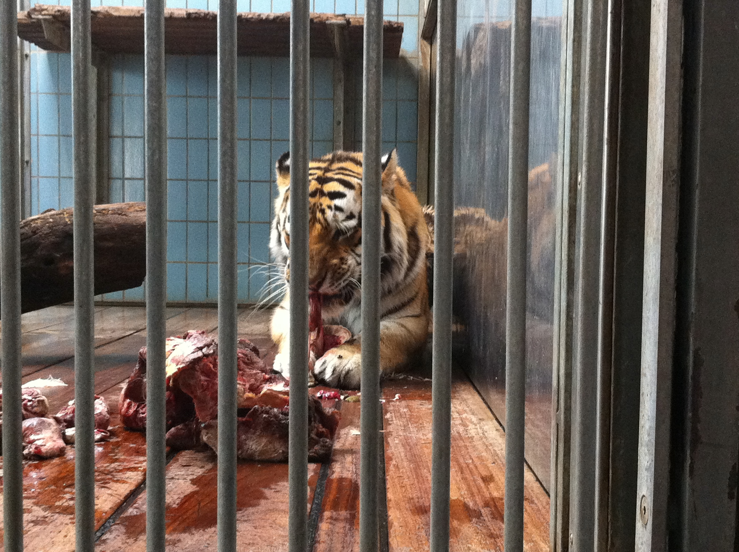 Zoo tiger